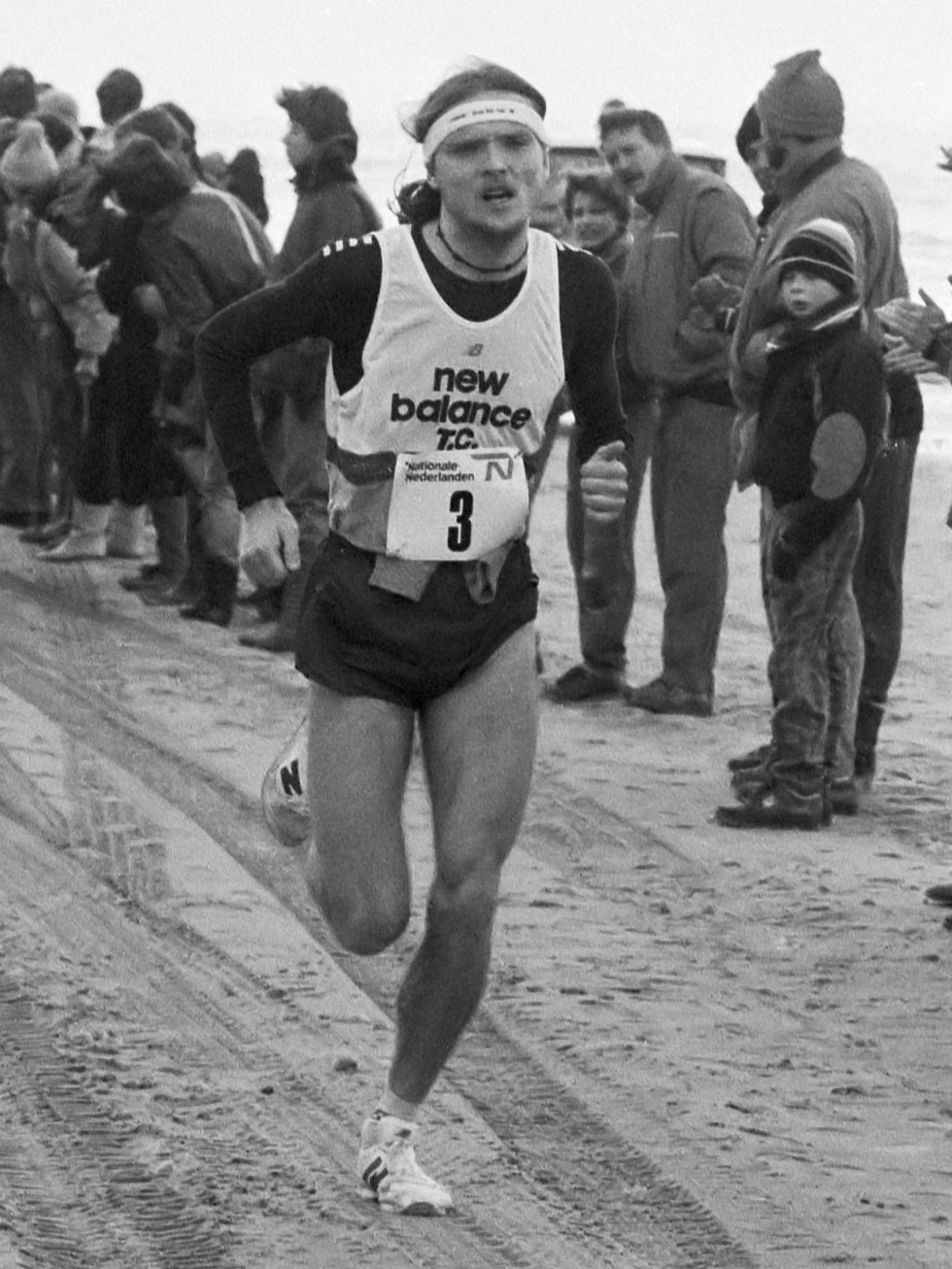 14e halve marathon in Egmond aan Zee. Carlos Lopez 12 januari 1986